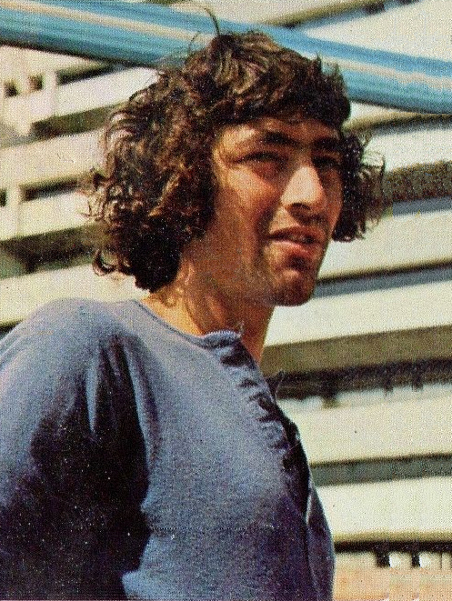 CAMPIONI dello SPORT 1973/74-Figurina n.62- BEDFORD-GBR-ATLETICA LEGG.